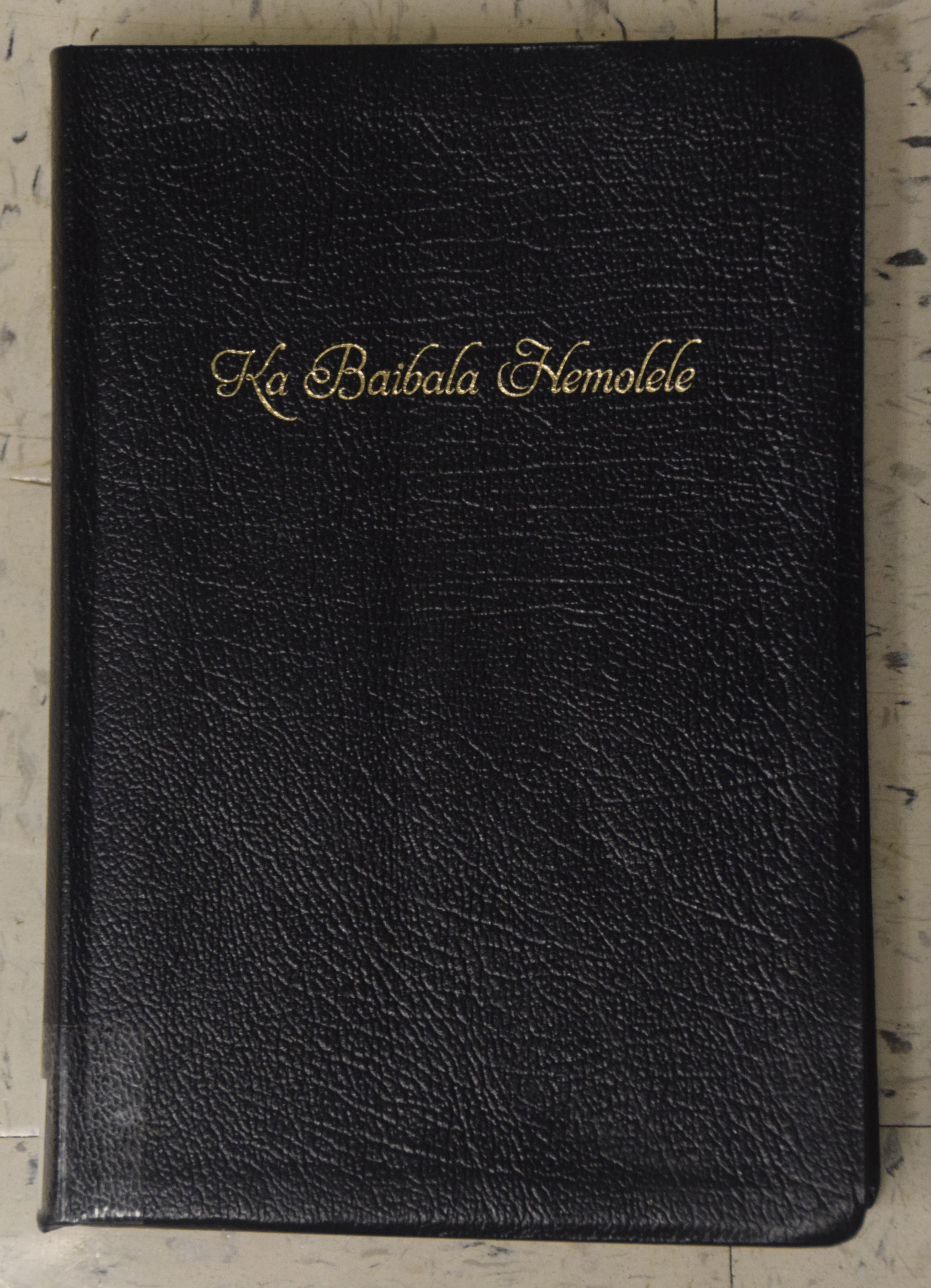 The Hawaiian language Bible cover